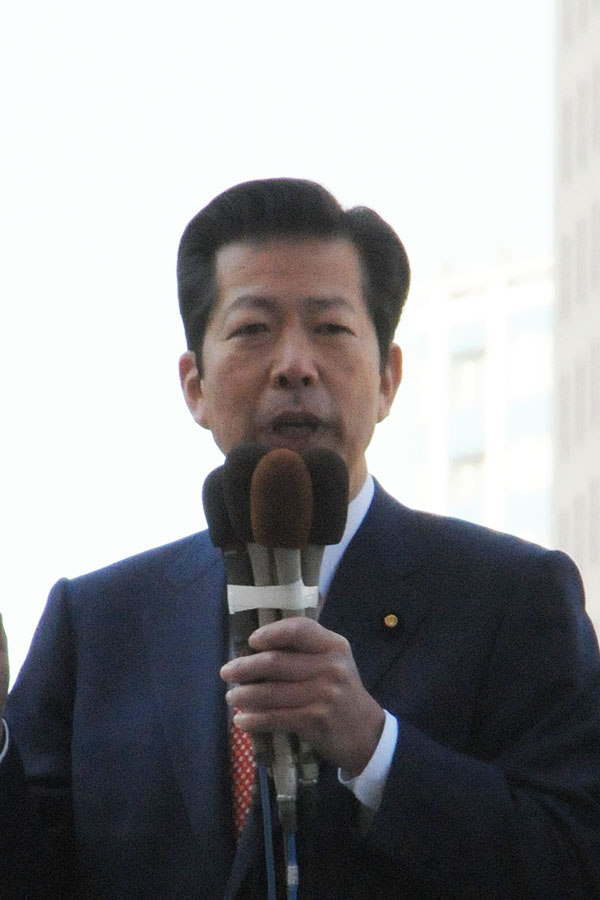 山口那津男参院議員、新宿西口での街頭演説。